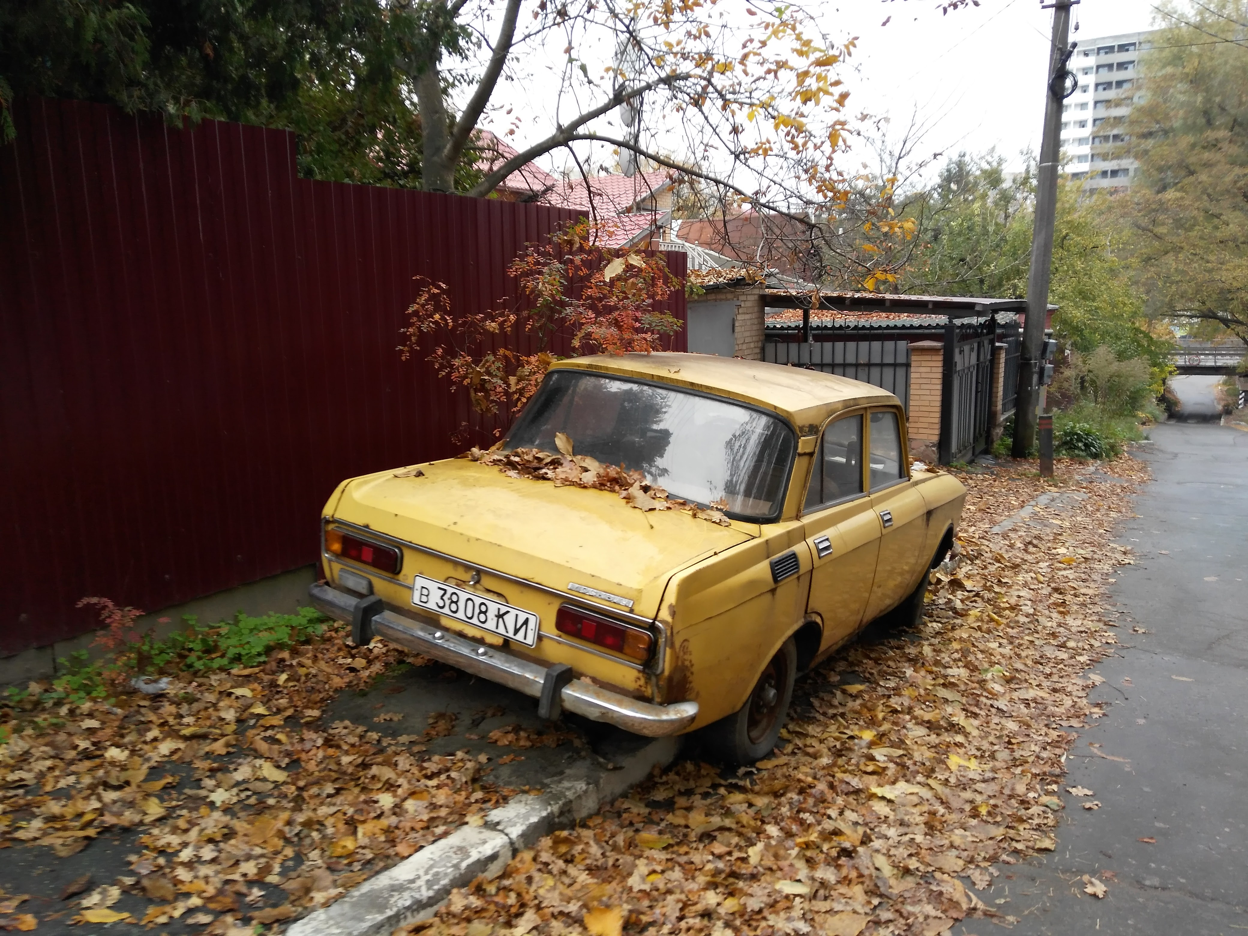 Москвич-2140, АЗЛК, у м. Києві